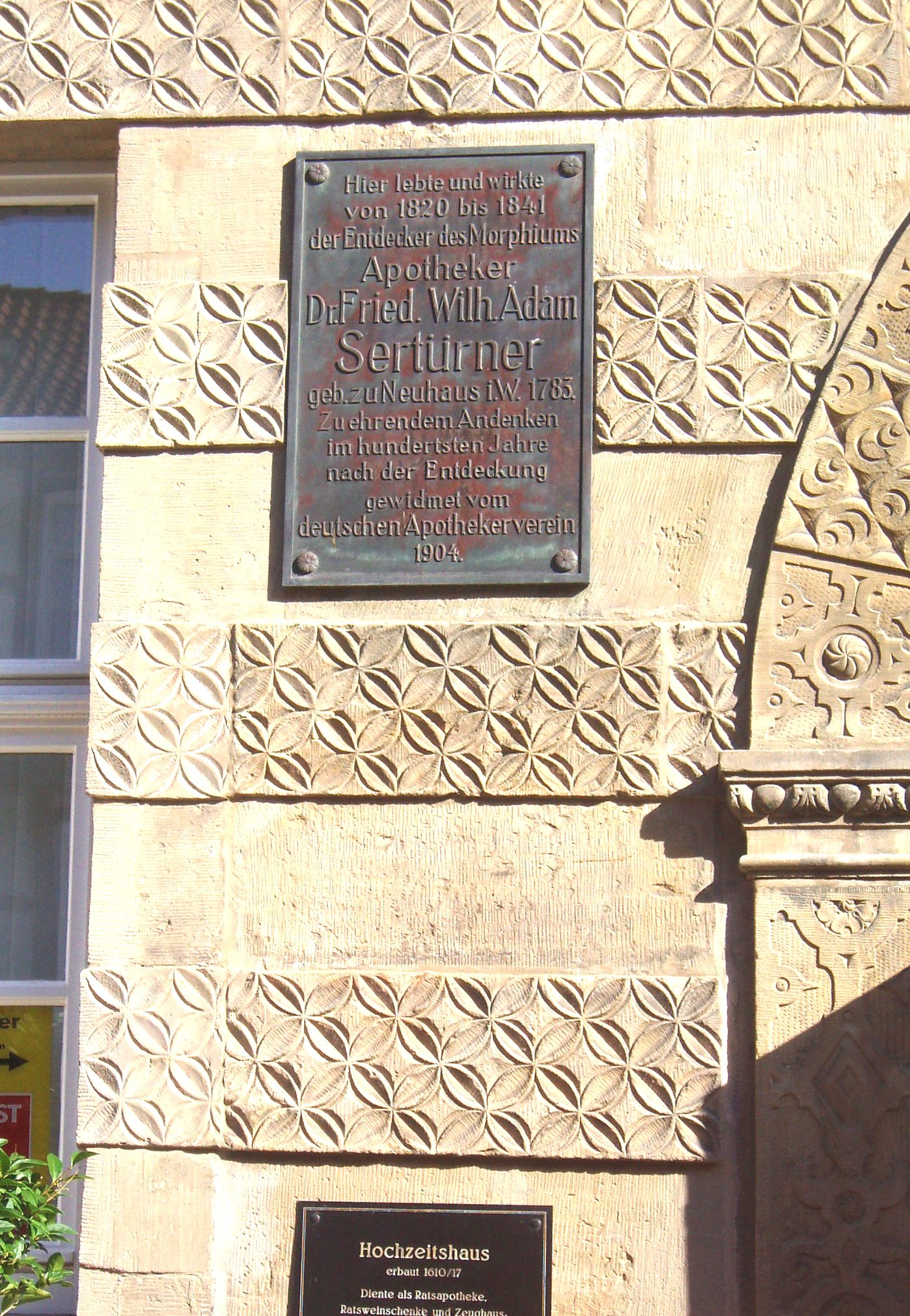 Sertürner-Gedenktafal in Hameln, Hochzeitshaus